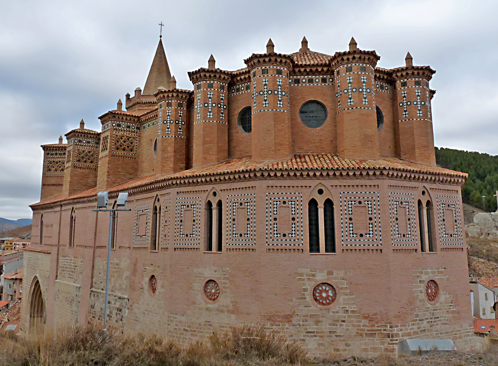 Montalbán - Iglesia del Apóstol Santiago el Mayor (si. XIII y XIV) - Vista desde el ábside